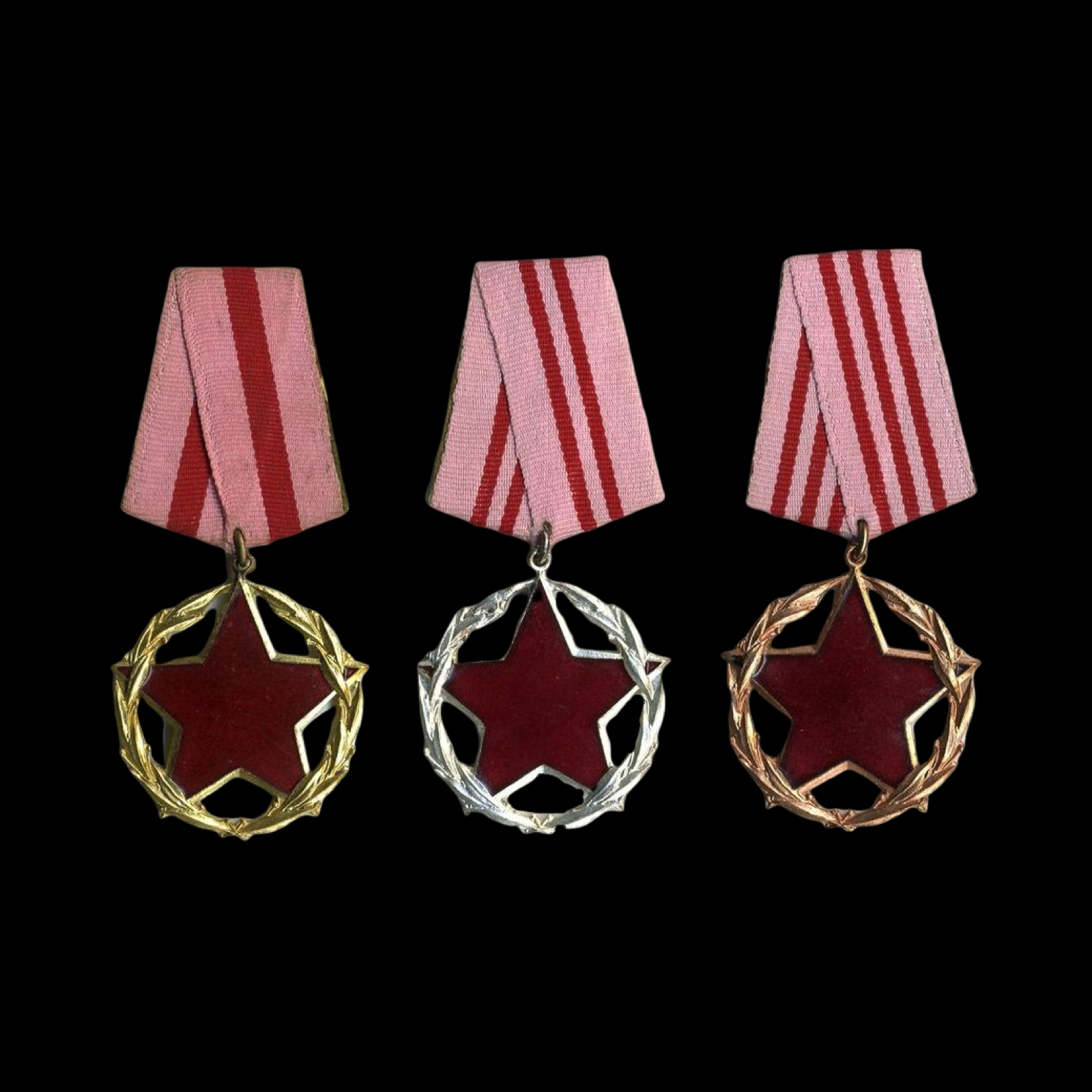 Urdhëri për shërbime të shquara shtetërore dhe shoqërore.